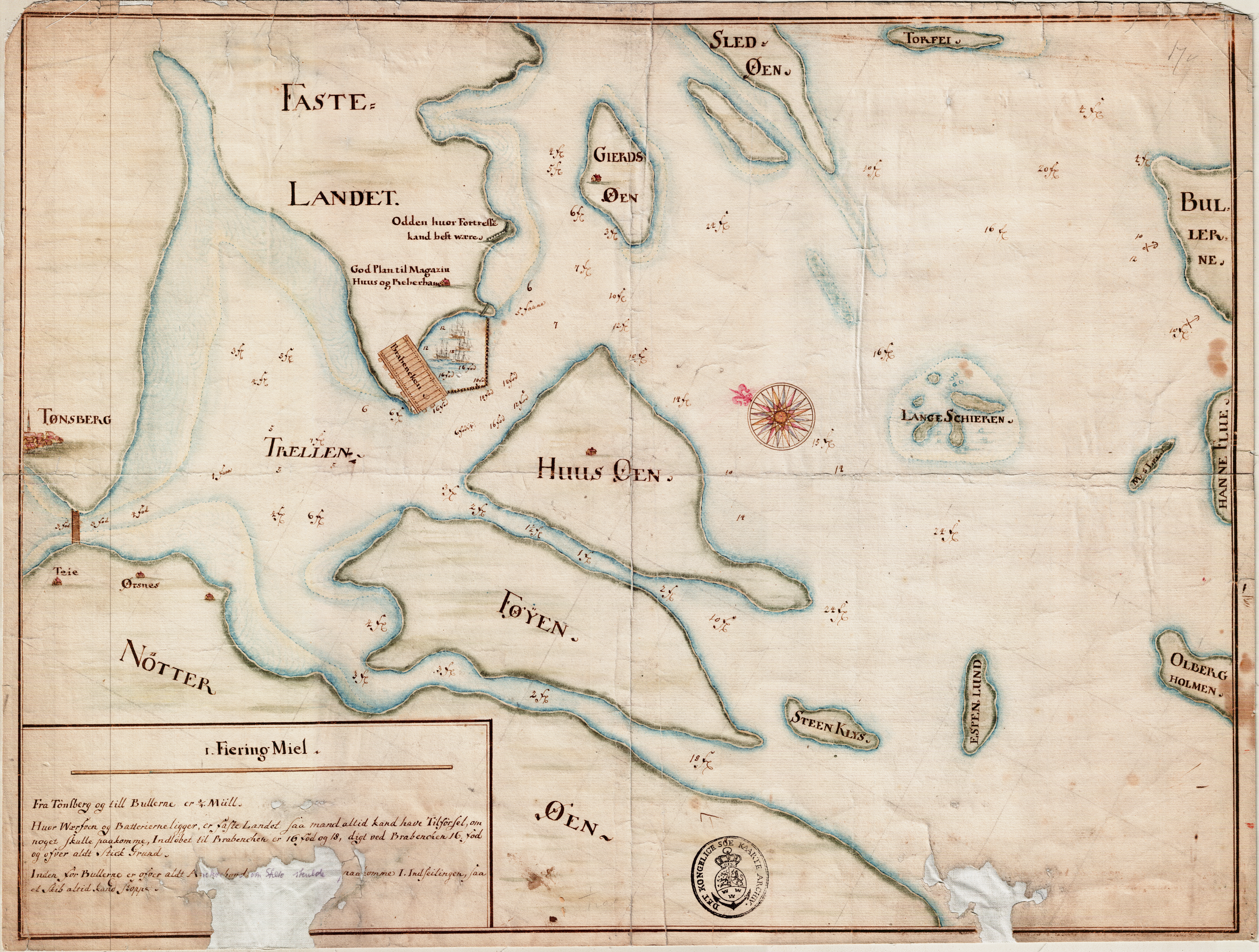 Sjøkart over havormådet mellom Tønsberg og Nøtterøy fra ukjent årstall. Håndtegnet i omtrentlig målestokk 1:10000. Original kartstørrelse ca 57 x 43 cm. Et eksemplar befinner seg hos Statens kartverk Sjø i Stavanger.